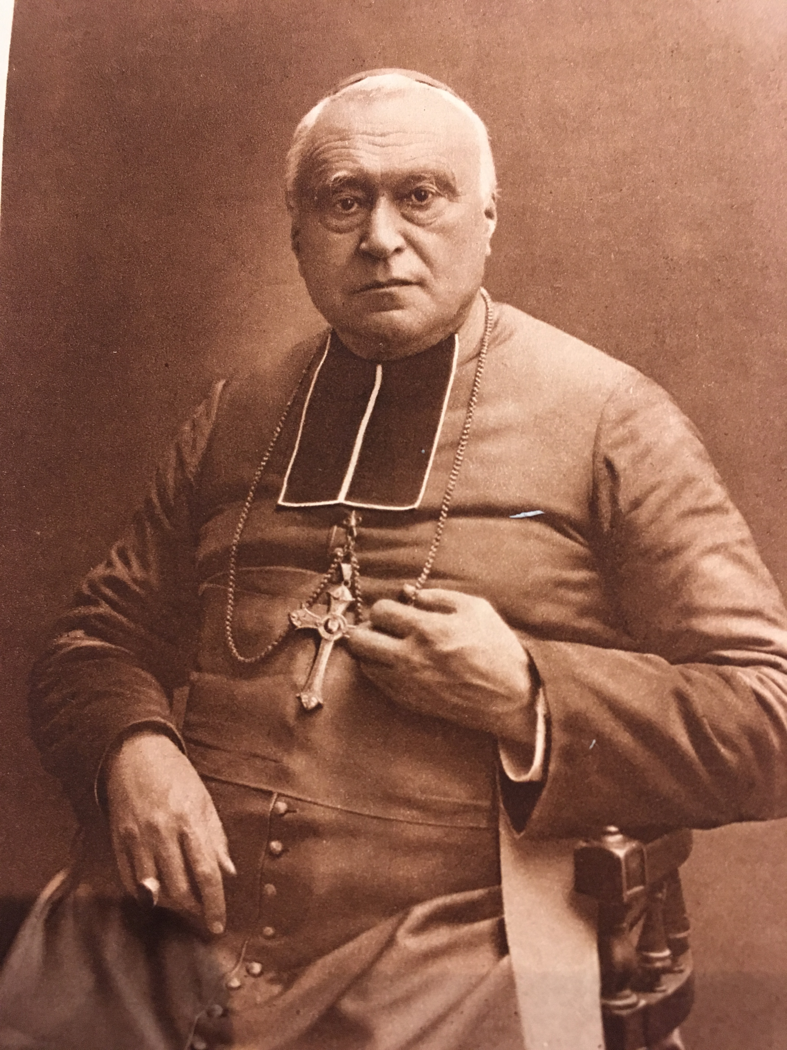 Monseigneur Gauthey